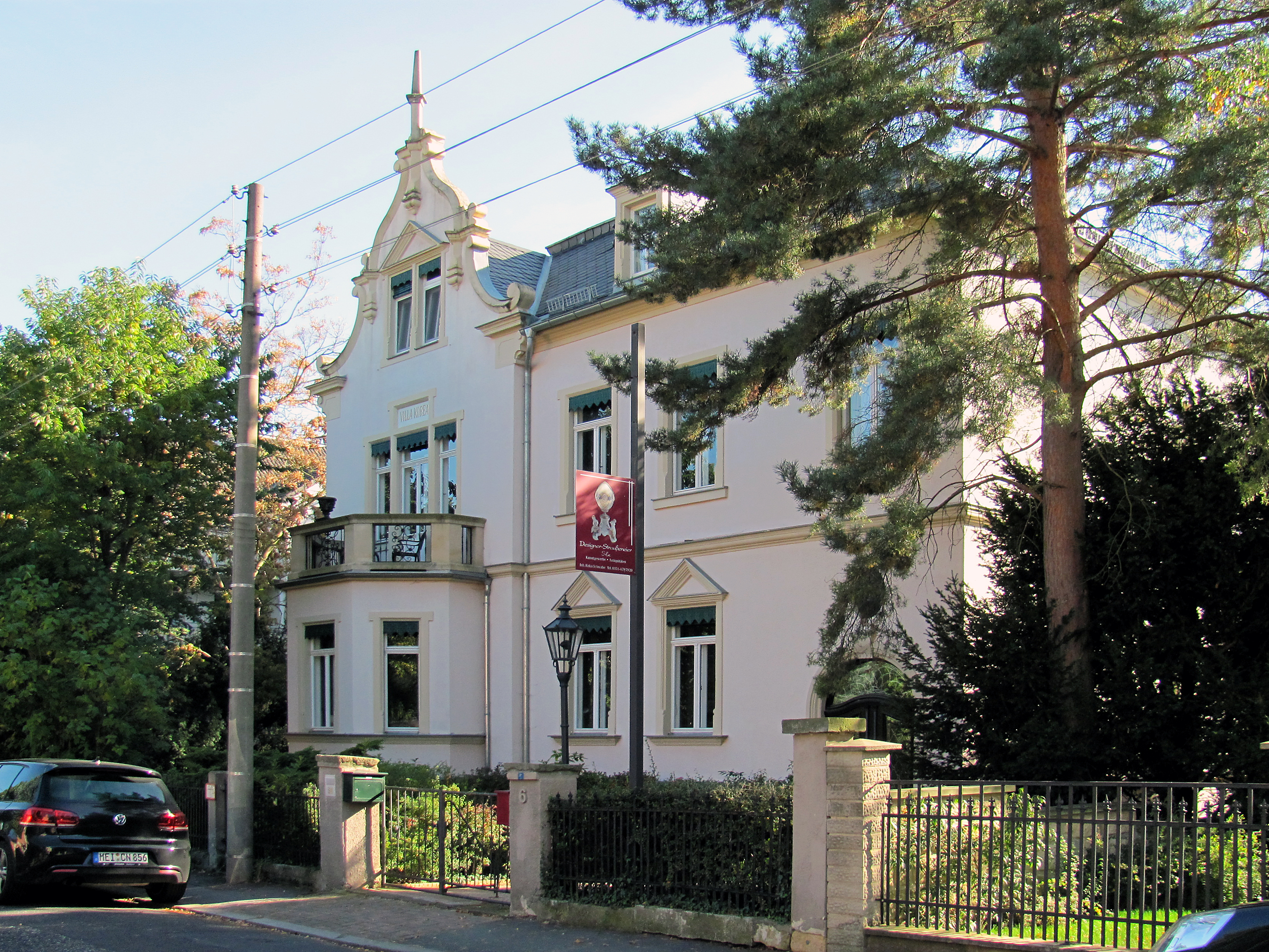 Radebeul, Villa Korea